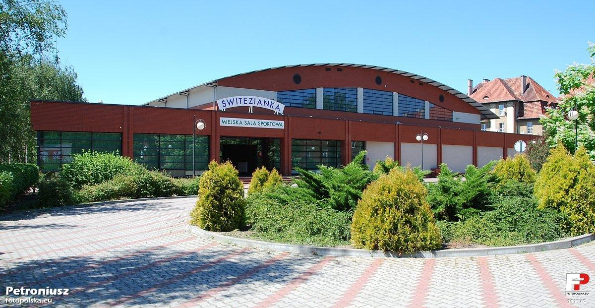 Miejska Hala Sportowa "Świtezianka" przy ul. Marcinkowskiego 10a w Wolsztynie. Przed halą ładnie zagospodarowany plac.